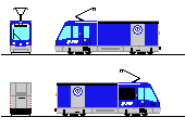 Ansichtszeichnung Steuerwagen der Güterstraßenbahn in Dresden